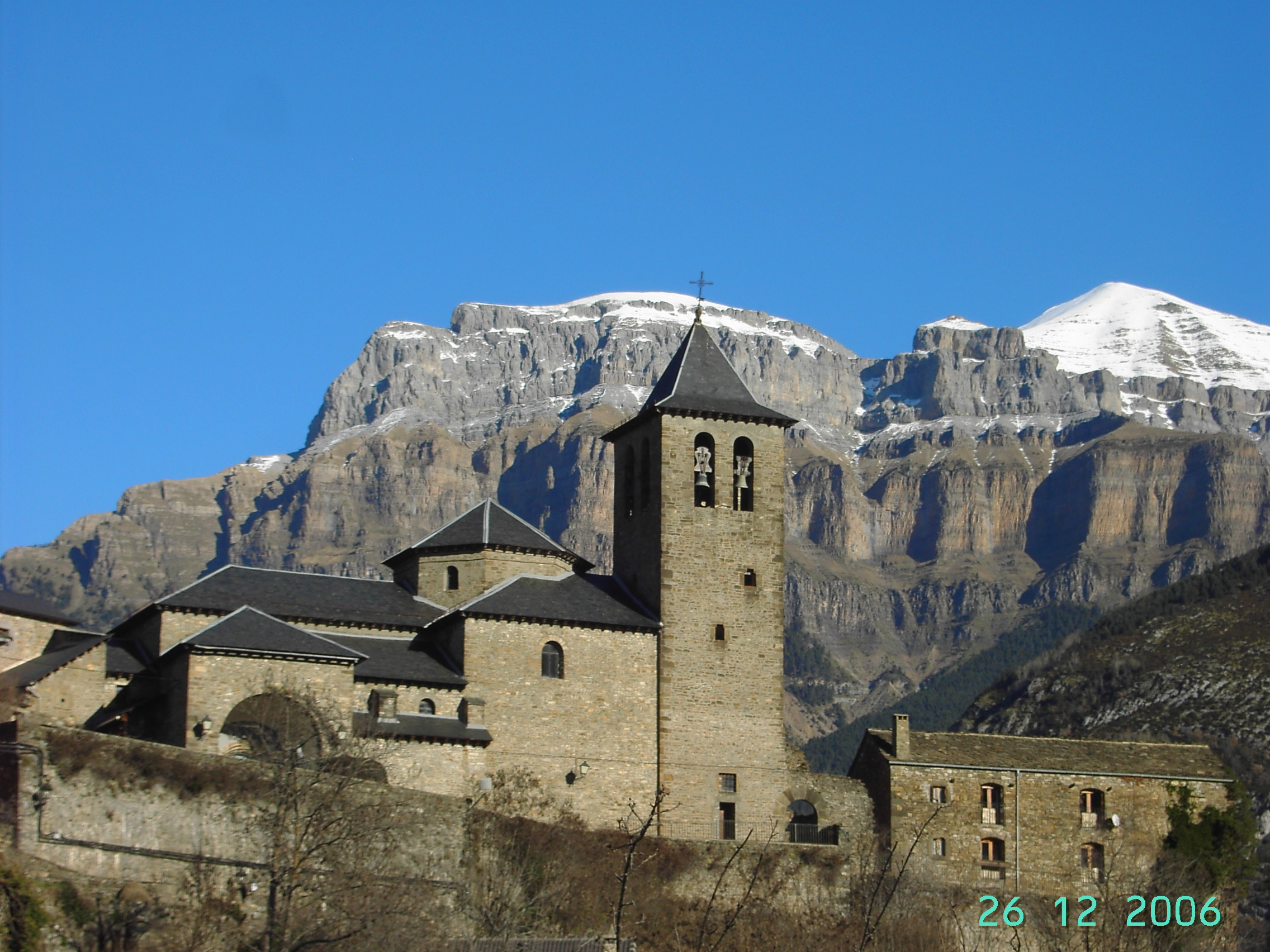 Aragonés: A villa de Torla, en a boca d'a valle d'Ordesa.